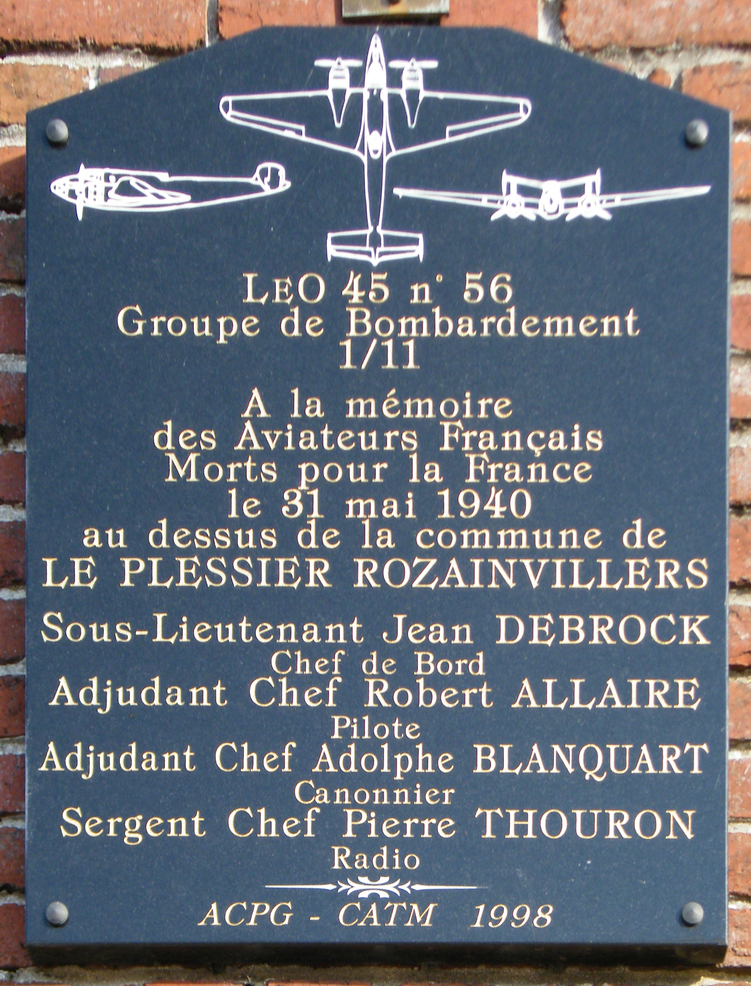 Stèle commémorative sur le mur de l'église du village.